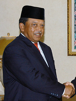 King Tuanku Syed Sirajuddin of Malaysia